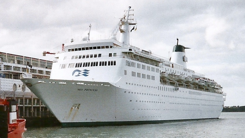 Hafen Auckland Neuseeland